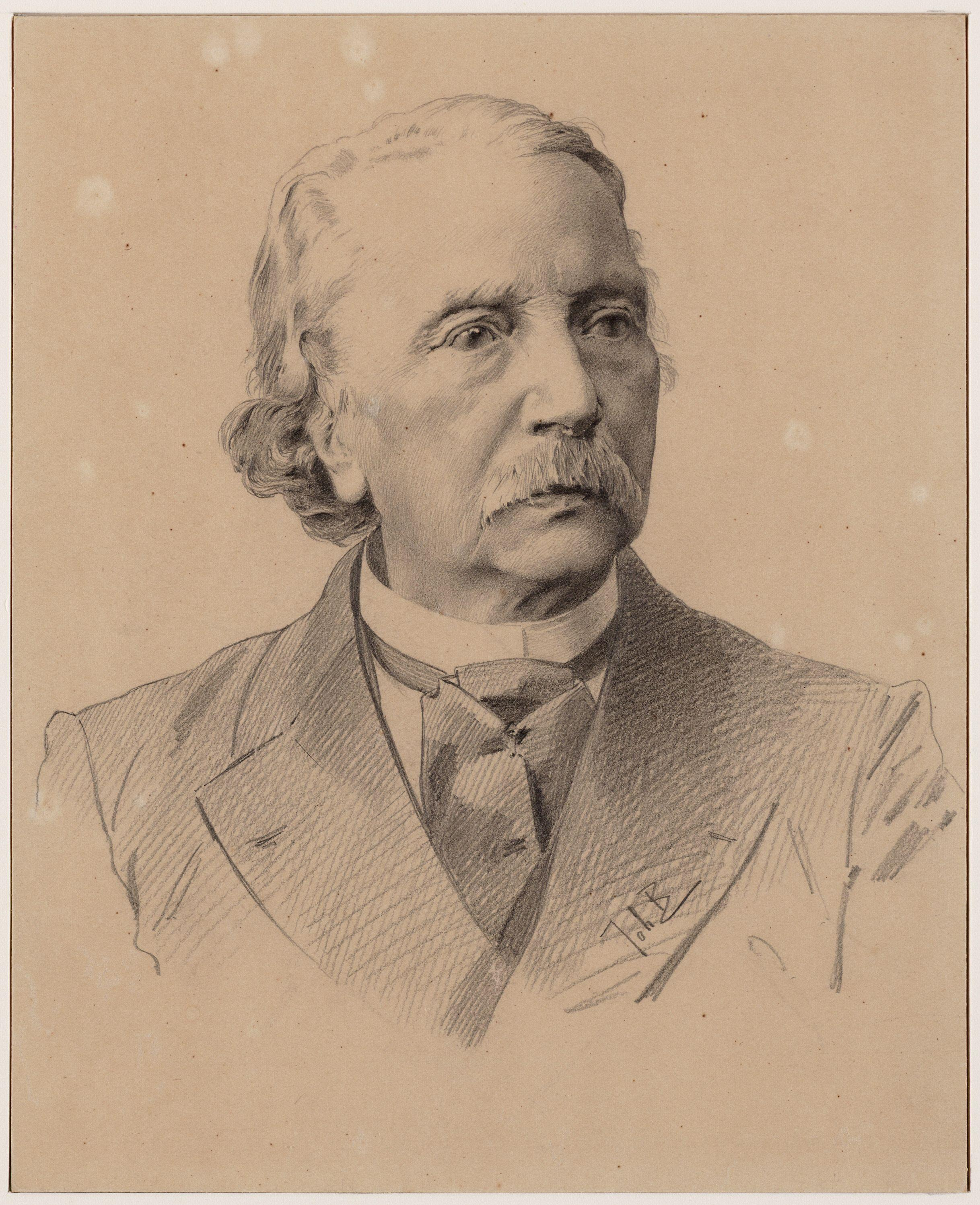 Beschrijving Portret van Prof. Willem van der Vlugt (1853-1928), hoogleraar rechten te Leiden (1879-1923) en lid Tweede Kamer (1902-1906) Documenttype tekening Vervaardiger Braakensiek, J.C. (Johan Coenraad, 1858-1940) Collectie Collectie Stadsarchief Amsterdam: tekeningen en prenten Datering 1900 ca. Inventarissen Afbeeldingsbestand 010097007986